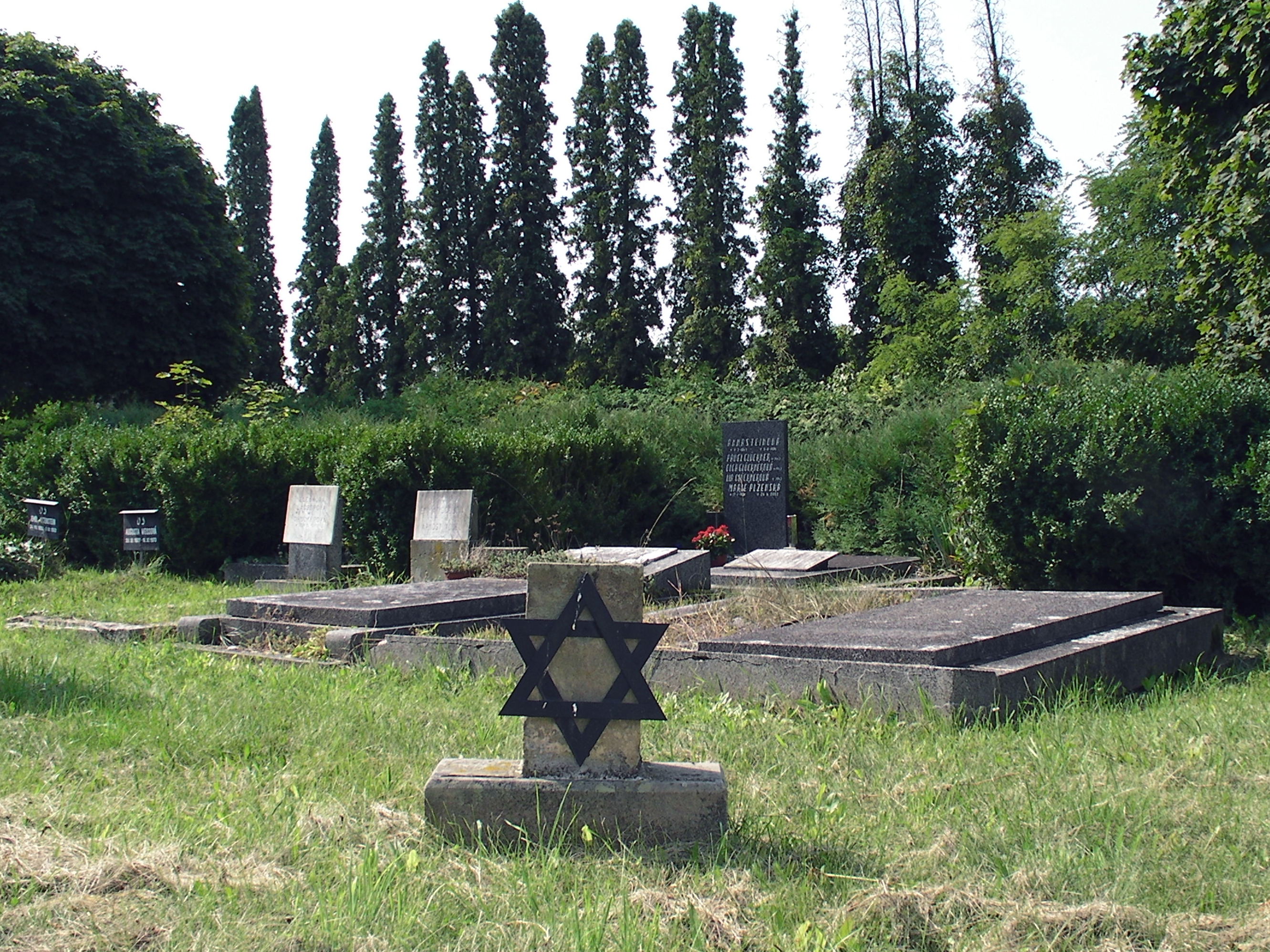 Židovská část hřbitova s pomníkem.